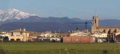 Imatge del poble de Navata